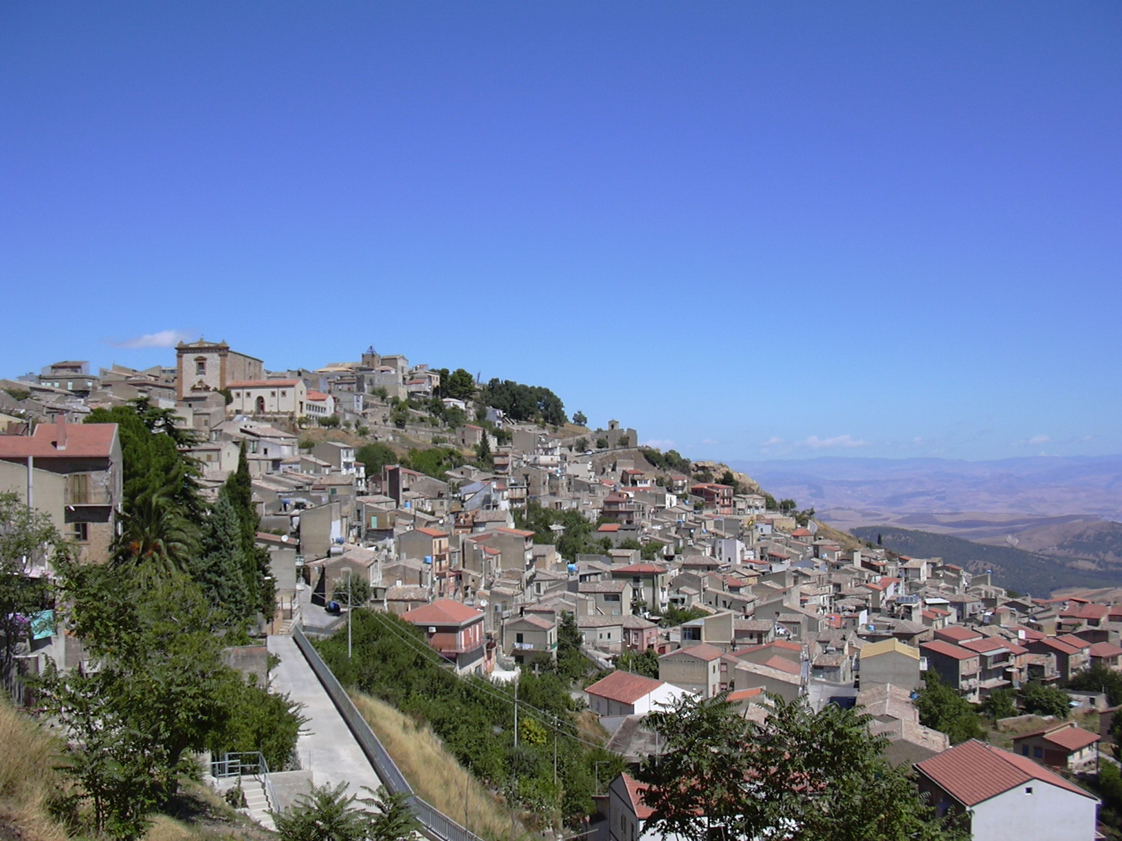 Aidone - EN_Sicilia: Panorama dell'antico quartiere di San Giacomo, sono visibili le chiese di San Domenico, dell'Annunziata e San Lorenzo